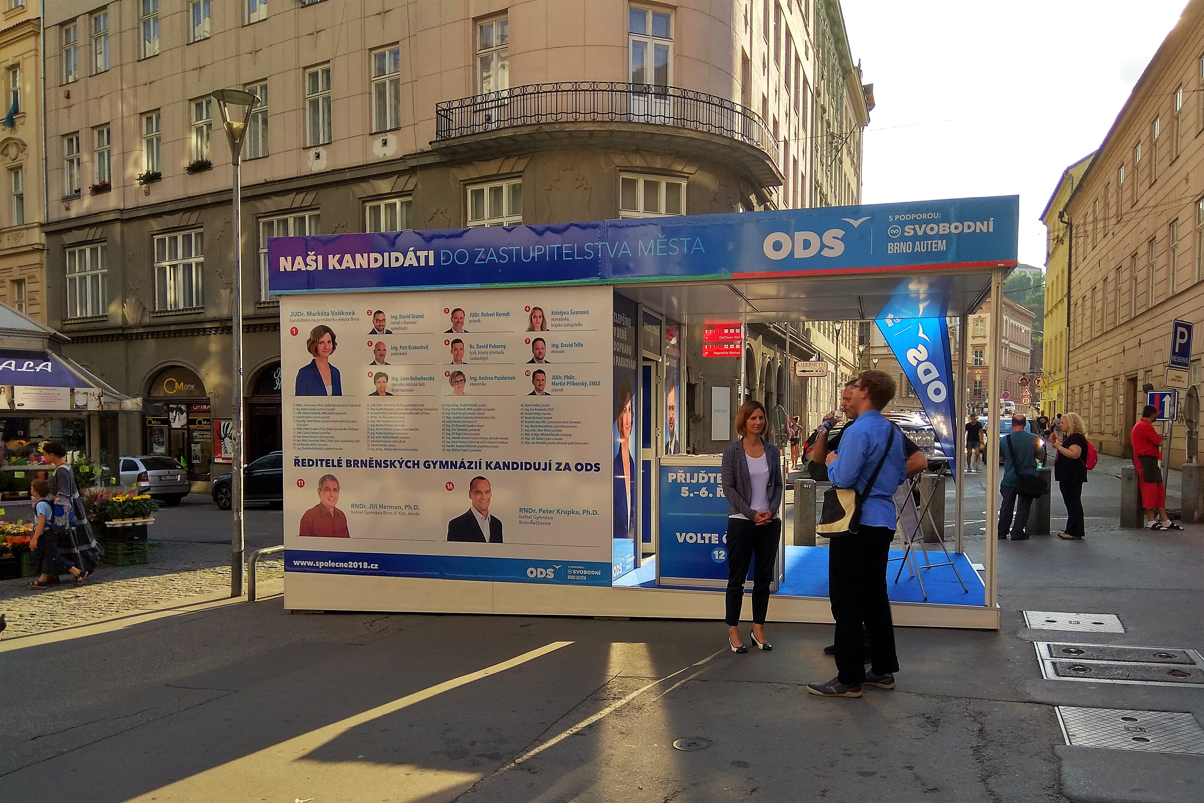 Předvolební stránek Občanské demokratické strany (s podporou Svobodných a spolu Brno Autem) před komunálními (a senátními) volbami v říjnu 2018. Před stánkem stojí lídryně kandidátky Markéta Vaňková.